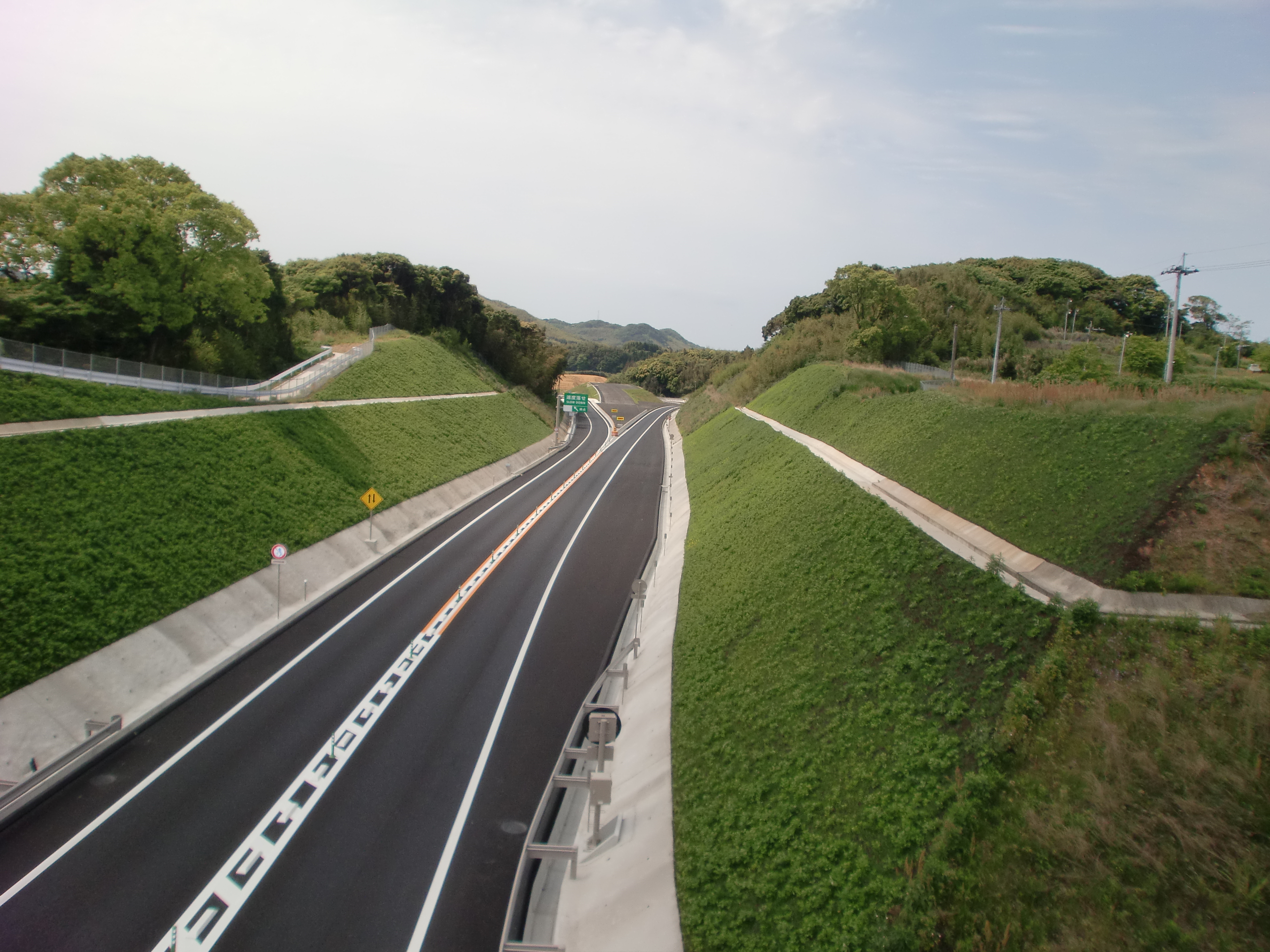 南九州西回り自動車道阿久根インターチェンジを跨道橋から未開通の鹿児島方面を望む。